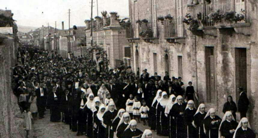 Solenne Processione di Sant' Antonio, anno del Signore 1936.